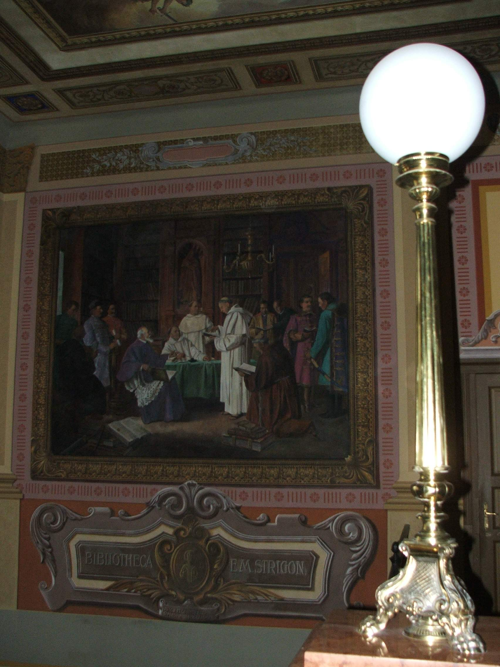 A Főszékesegyházi Könyvtár folyosójának fala